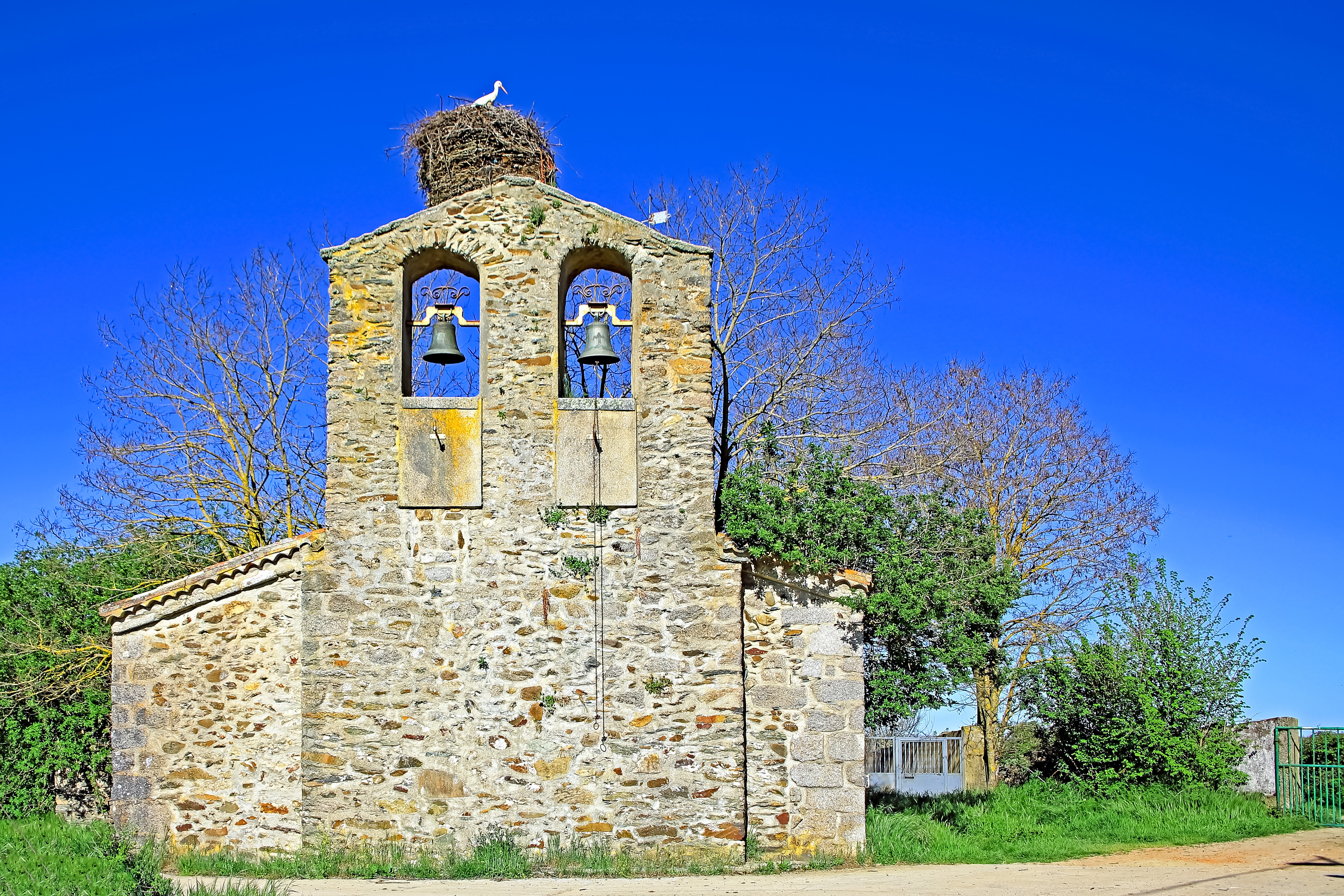 Alberguería de Herguijuela es una localidad que pertenece a Herguijuela del Campo, comarca de Entresierras, provincia de Salamanca.